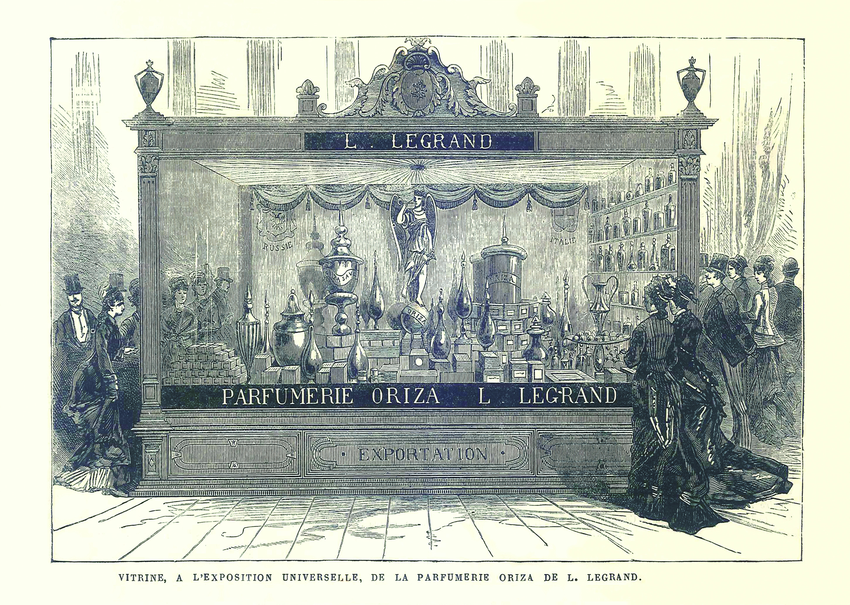 Vitrine pour les parfums Oriza L. Legrand, Exposition universelle de Paris en 1867 (in L'Univers illustré).